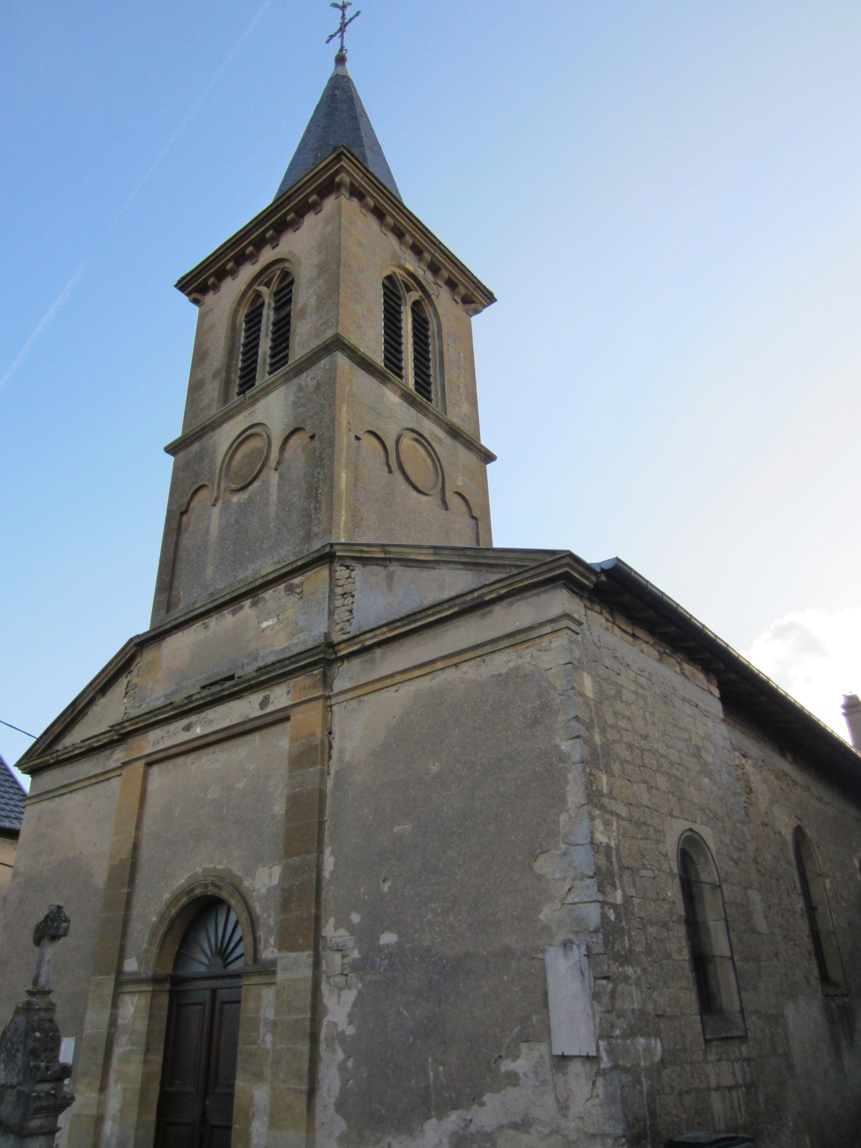 Description eglise Immonville eglise Immonville